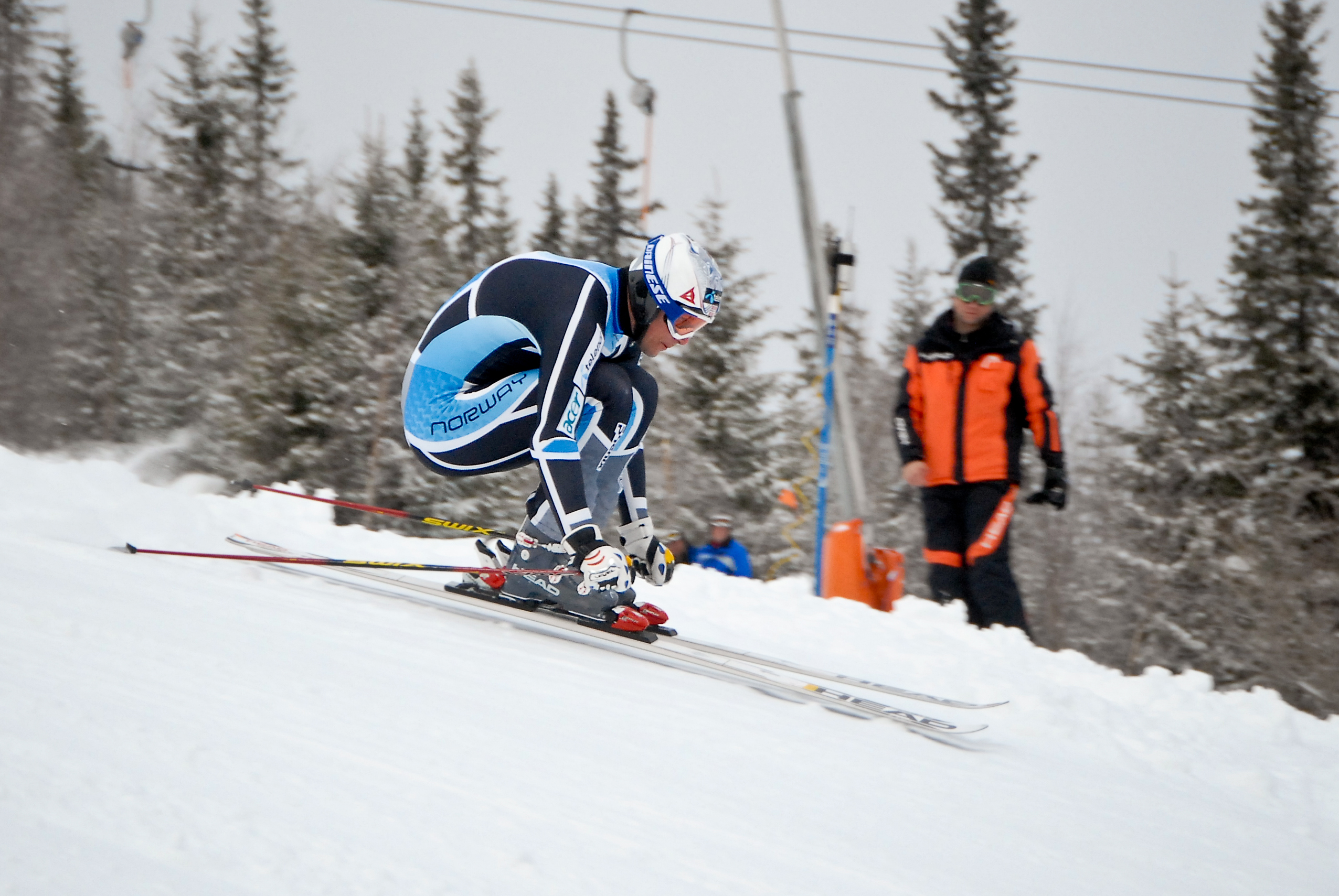 Aksel Lund Svindal trener i Høgegga Renn- og Treningssenter i Trysil. Foto: Ola Matsson